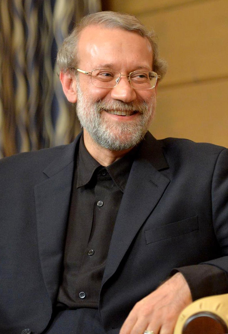 Спикер Исламского консультативного совета (парламента) Исламской Республики Иран Али Лариджани во время беседы с президентом России Владимиром Путиным